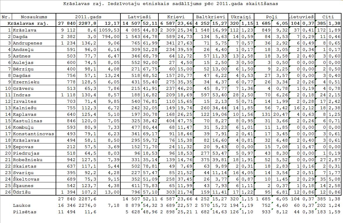 Latvijas 2011 gada tautas skaitīšanas dati